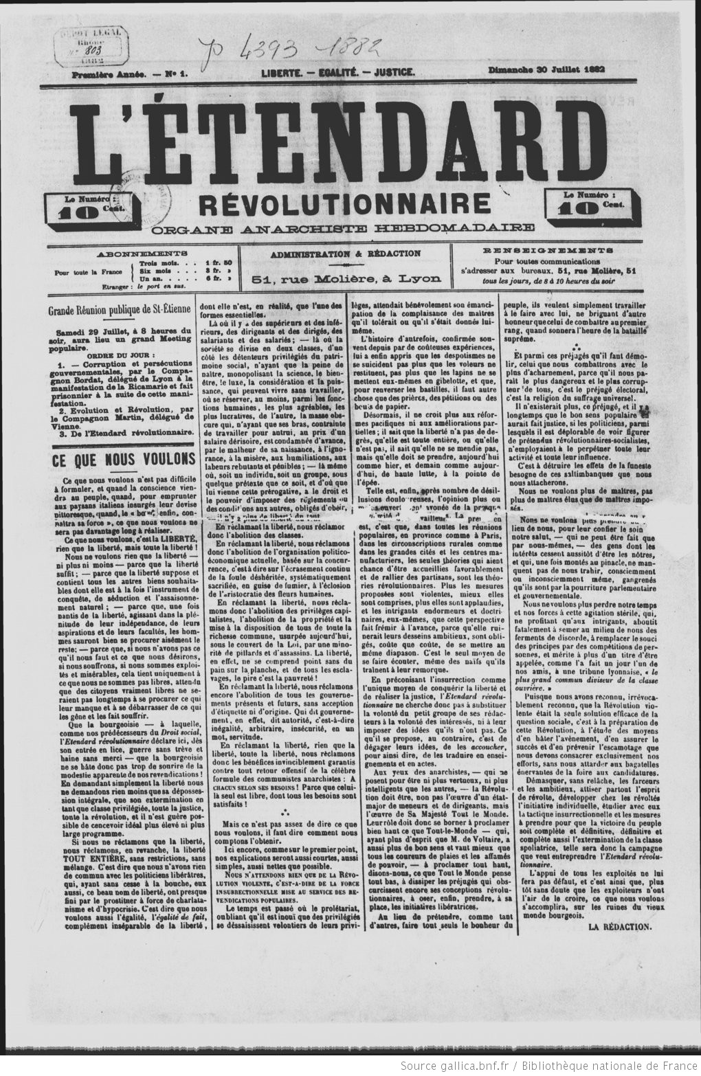 L’Étendard Révolutionnaire, organe anarchiste hebdomadaire : 12 numéros publiés entre juillet et octobre 1882.